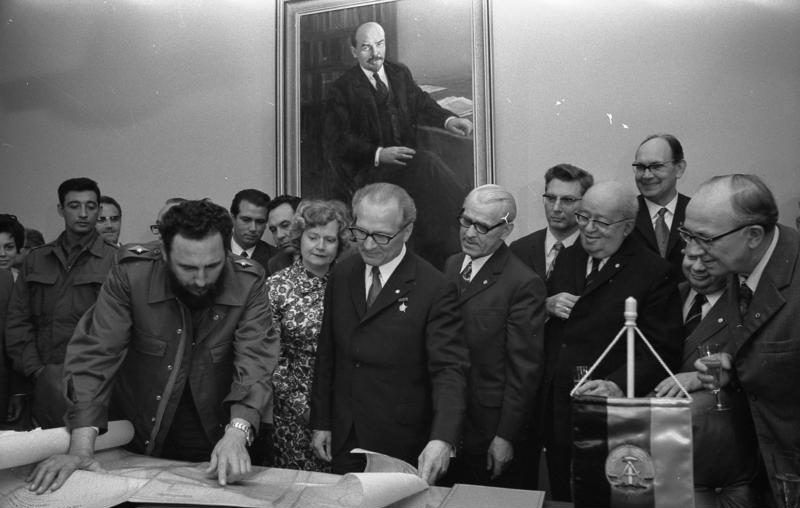 Castro, Landkarte Kubas überreicht ADN- ZB, Koard, 19.6.72, Berlin: Castro, Landkarte Kubas überreicht Fidel Castro (l.) überreichte nach der Unterzeichnung des Kommuniques am 19.6.72 Erich Honecker (Mitte) eine Landkarte der Republik Kuba. Sie zeigt eine Insel, die den Namen " Ernst Thälmann" trägt, und deren Südseite "Strand DDR" heißt. An diesem Strand schlugen die kubanischen Patrioten an der "Schweinebucht" die imperialistische Aggression erfolgreich zurück. Bei der feierlichen Übergabe des Geschenks waren u.a. Alfred Neumann, Friedrich Ebert, Werner Lemberz und Willi Stoph zugegen (v.l.n.r.) Abgebildete Personen: Castro, Fidel: Ministerpräsident, Vorsitzender der KP, Kuba Honecker, Erich: Staatsratsvorsitzender, Generalsekretär des ZK der SED, DDR (GND 118553399) Ebert, Friedrich: Oberbürgermeister von Berlin, DDR Lamberz, Werner: Politbüro des ZK der SED, Leiter der Abteilung Agitation beim ZK, DDR (GND 124666779) Neumann, Alfred: Stellvertretender Ministerratsvorsitzender, Mitglied Politbüro ZK SED, DDR (GND 12009326X) Stoph, Willi: Ministerpräsident, Staatsratsvorsitzender, Armeegeneral, SED, DDR